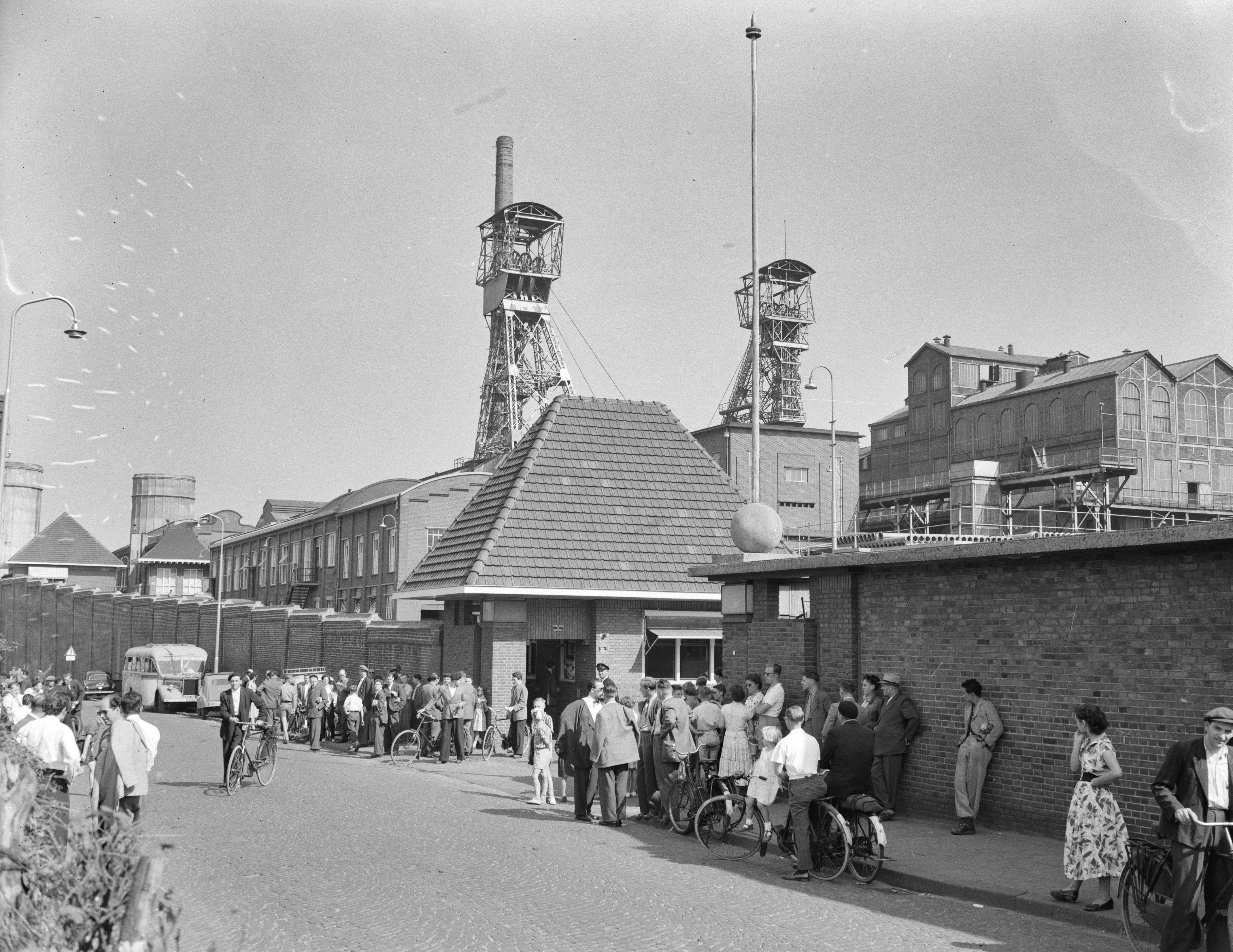 Collectie / Archief : Fotocollectie Anefo Reportage / Serie : [ onbekend ] Beschrijving : Redding van 3 mijnwerkers uit Willem-Sophiamijn. Op donderdag 18 augustus 1955, om 20.30 uur, stortte op de 217-meter verdieping van de Willem Sophiamijn in Spekholzerheide een gang in waardoor drie kompels de weg terug zagen afgesneden. Via telefoon konden ze meldden dat het hun goed ging. Via een persluchtleiding werden ze ze van voedsel voorzien. Een Duitse boorploeg maakte over een lengte van 37 meter een gat om hen door te laten. Uiteindelijk kwamen Hubert Bertram, Piet Schoormans en als laatste de eveneens Hubert Bertram geheten voorman weer boven. Belangstellenden buiten de poort Datum : 22 augustus 1955 Locatie : Kerkrade, Limburg, Spekholzerheide Trefwoorden : mijnbouw, ongevallen, steenkool Instellingsnaam : Willem-Sophia Mijn Fotograaf : Pot, Harry / Anefo Auteursrechthebbende : Nationaal Archief Materiaalsoort : Negatief (zwart/wit) Nummer archiefinventaris : bekijk toegang 2.24.01.04 Bestanddeelnummer : 907-2905